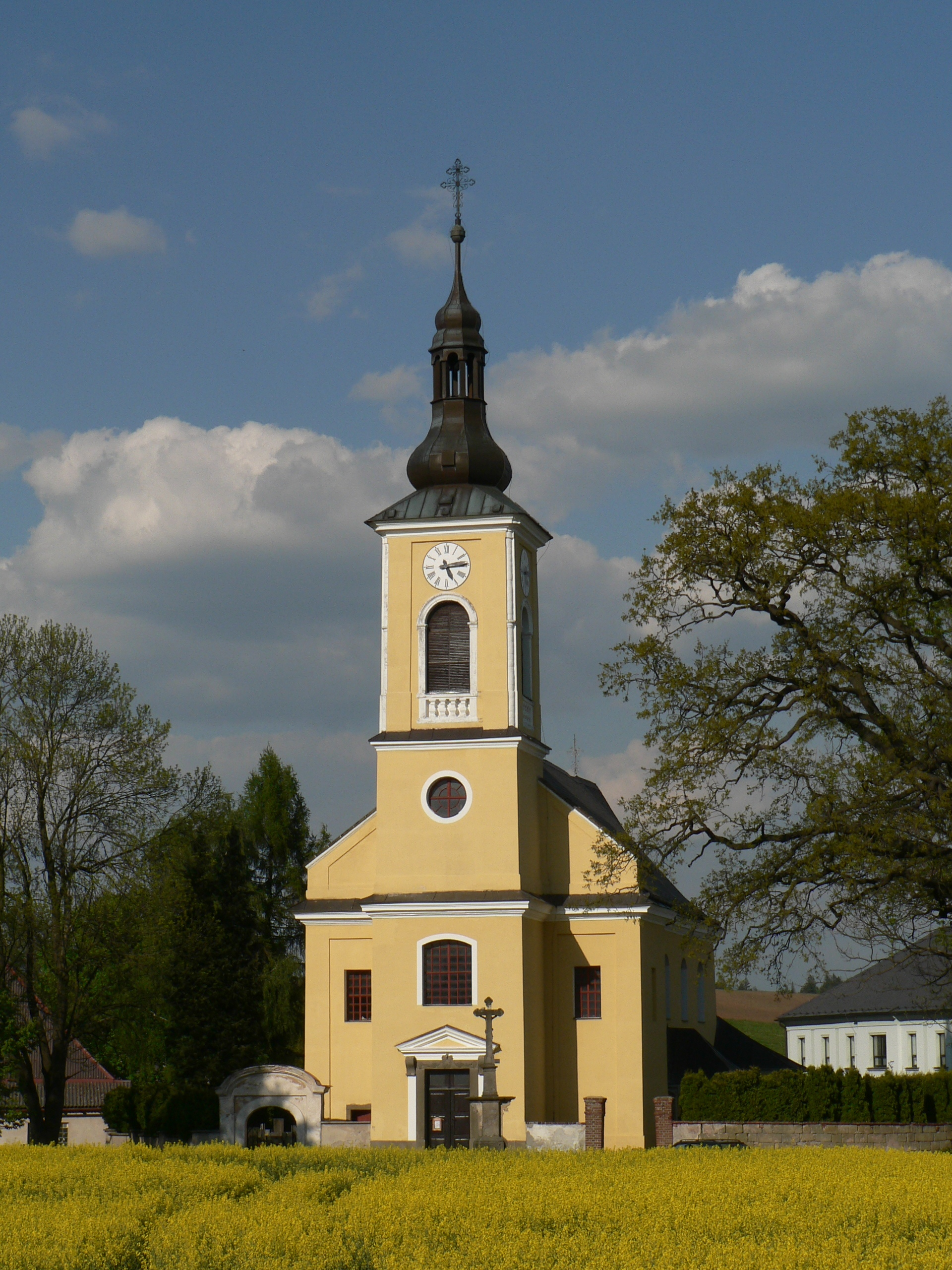 Kostel sv. Mikuláše v Ostrově u Lanškrouna